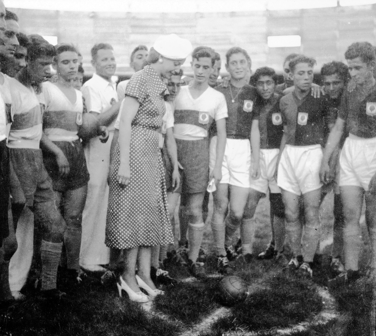 Eva da el puntapié inicial en el campeonato de fútbol infantil, 1948. Fondo Secretaría de Informaciones. General Archive of the Nation Native nameArchivo General de la Nación ArgentinaParent institutionPoder Ejecutivo Nacional LocationBuenos Aires, ArgentinaCoordinates34° 36′ 17″ S, 58° 22′ 14″ W Established28 August 1821Web pageAGNAuthority control : Q2860529 VIAF: 158621023 ISNI: 0000 0001 2375 5869 LCCN: n82144709 NKC: kn20121211004 WorldCat institution QS:P195,Q2860529 This file, was provided to Wikimedia Commonsthanks to an agreement between the General Archive of the Nation of Argentina and Wikimedia Argentina.